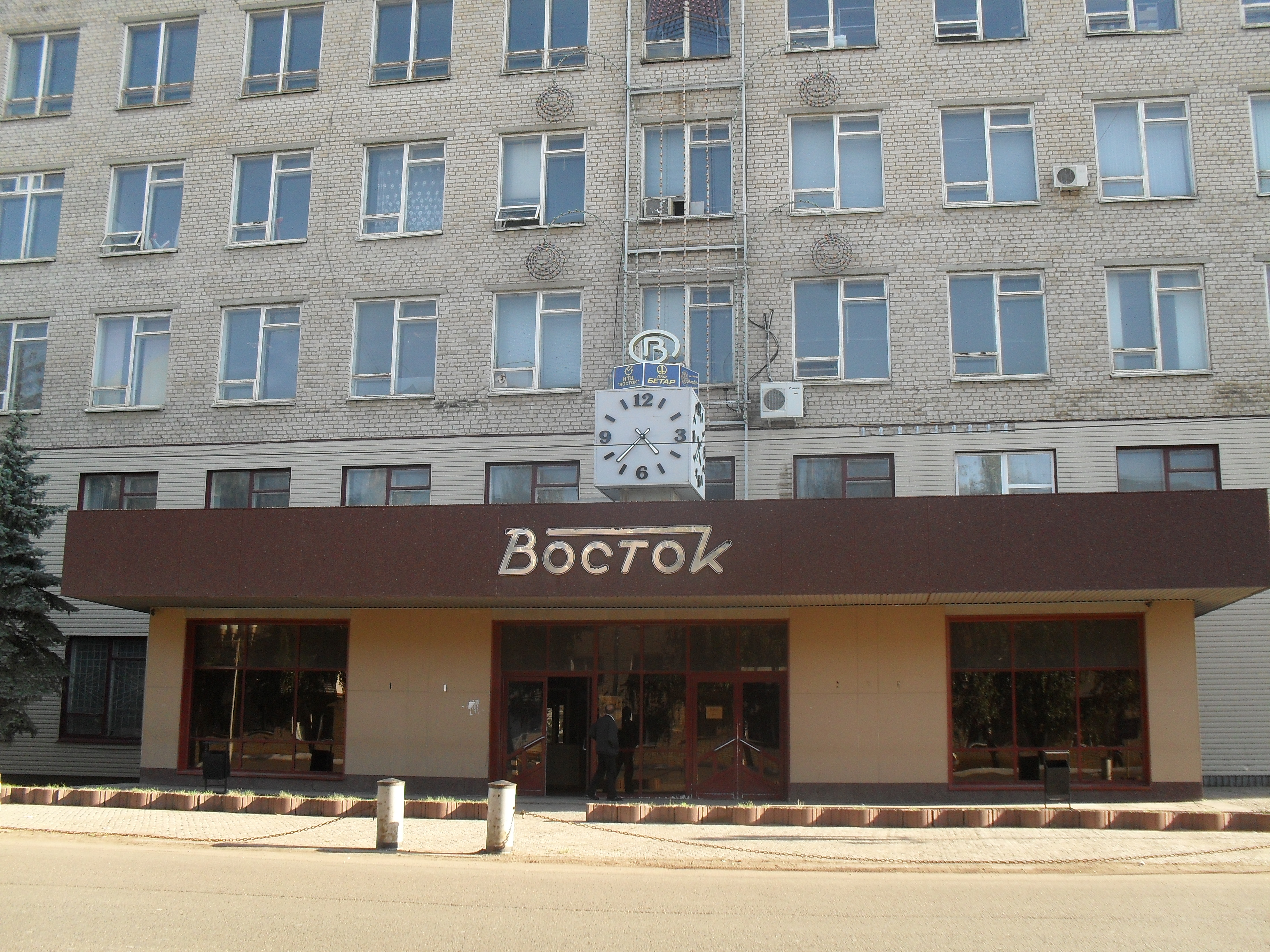 no original description